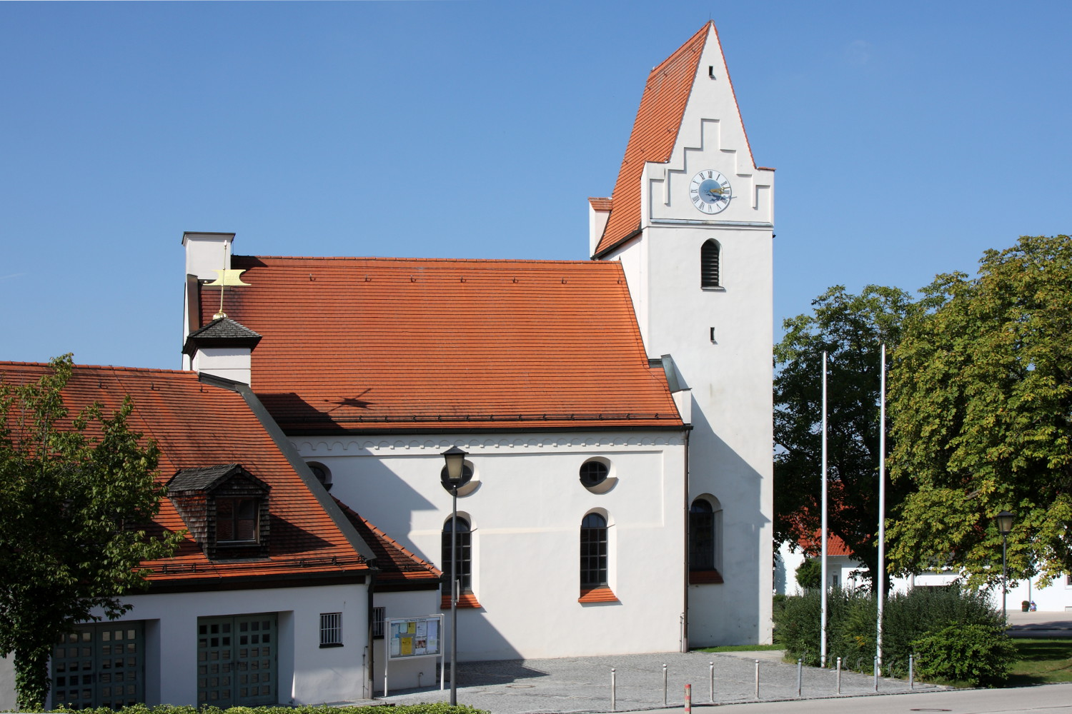 Kath. Filialkirche St. Katharina in Langenbruck, spätromanisch, Umgestaltung 18. Jahrhundert;This is a photograph of an architectural monument.